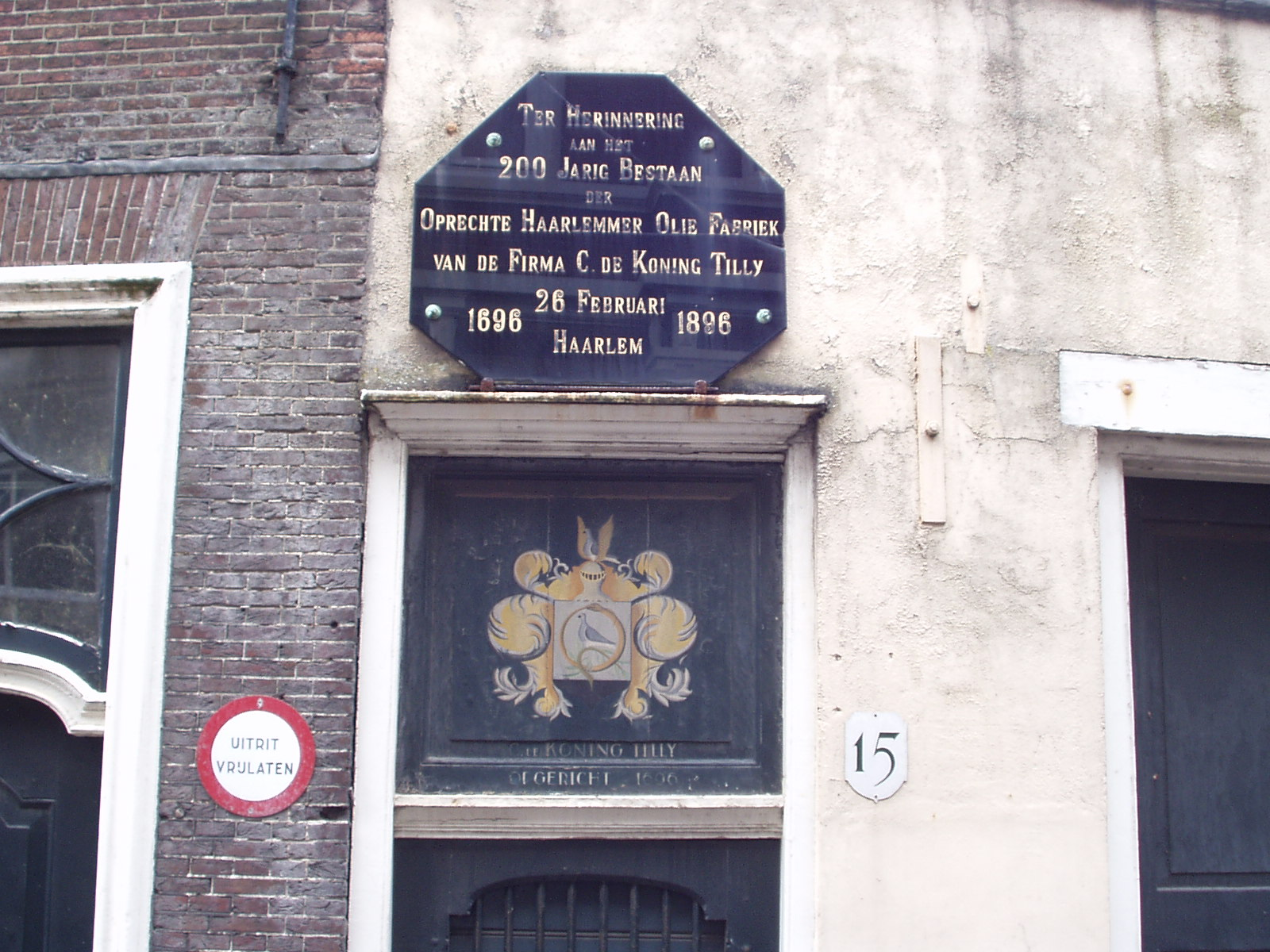 Spaarnwouderstraat, Haarlem, Netherlands. Herdenkingsplaquette voor de Oprechter Haarlemmer Oliefabriek C. De Koning Tilly.